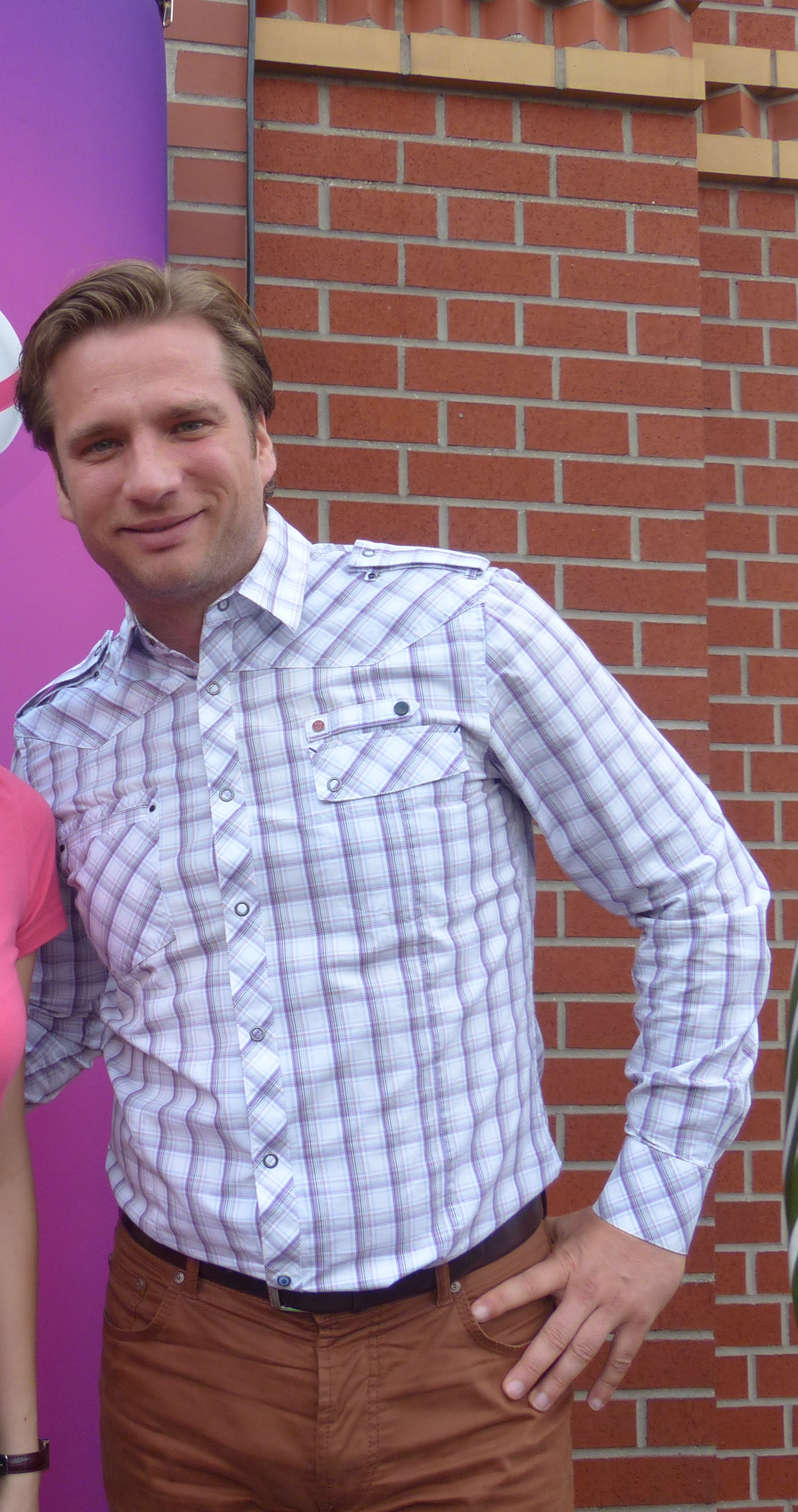 Norman Jeschke bei der Shrek - Das Musical Premiere, 19.10.'14, Düsseldorf